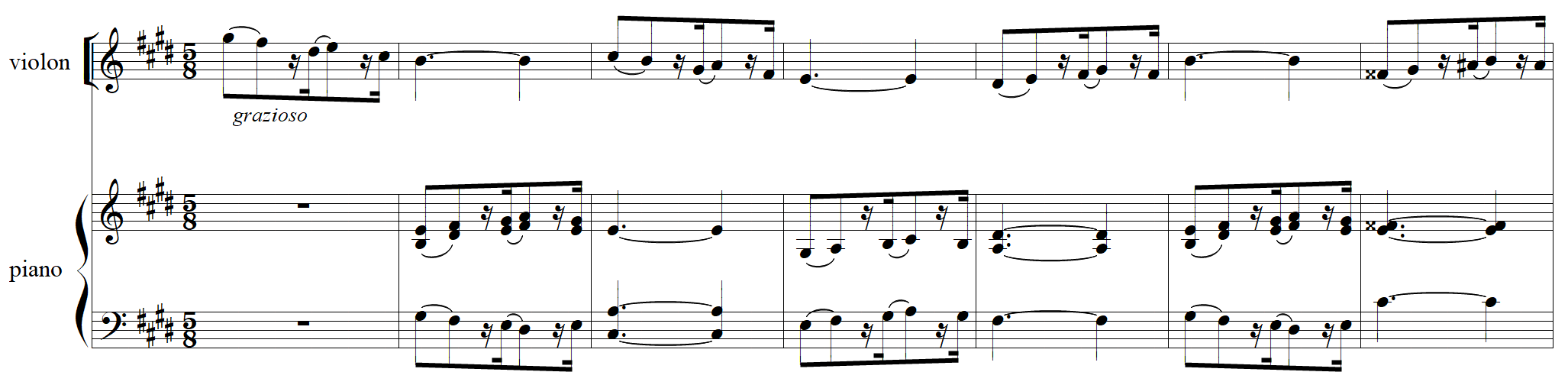 Camille Saint-Saens - trio n°2 avec piano zortzico